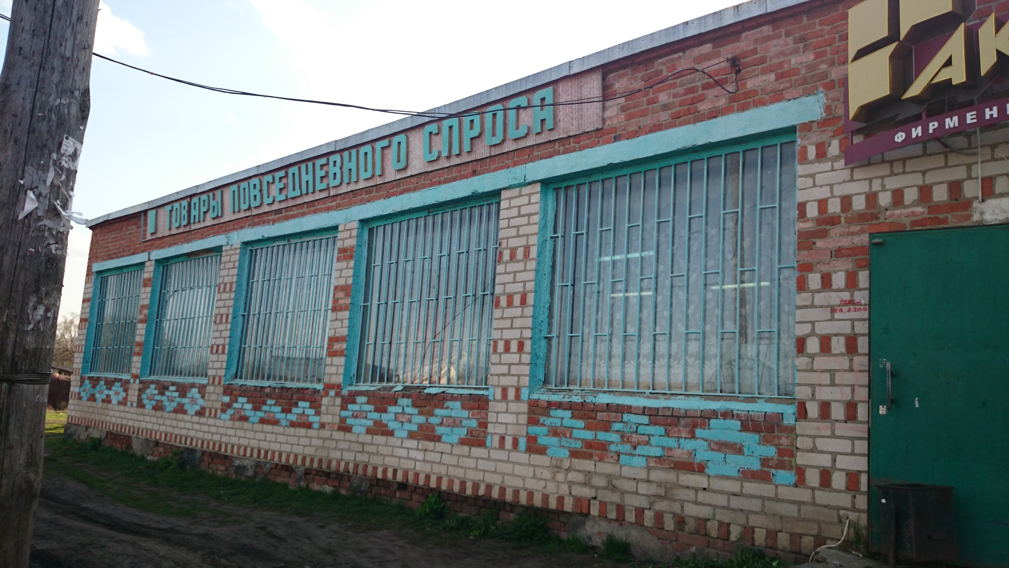 Климово 2 мая 2014